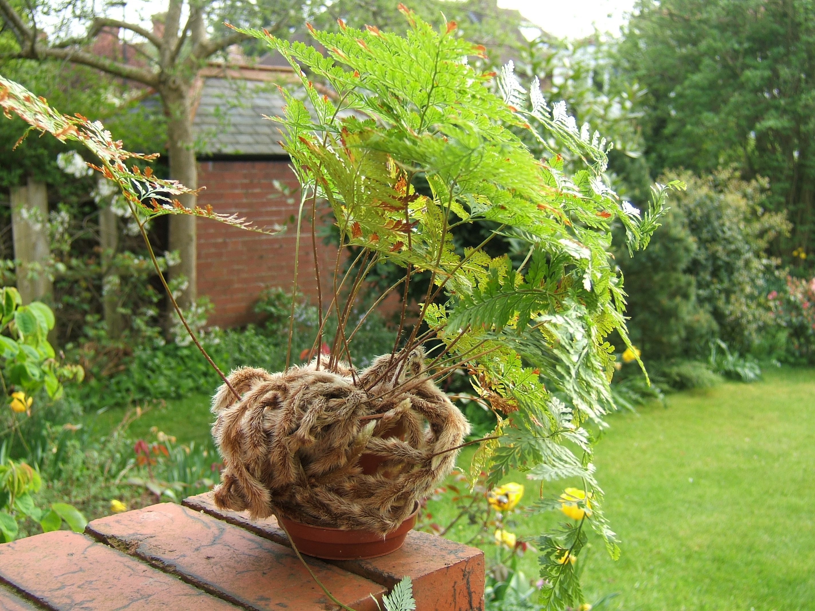 Davallia canariensis. Detalle del hábito. Ejemplar cultivado. Davallia canariensis. Cultivated, UK. May 2006.